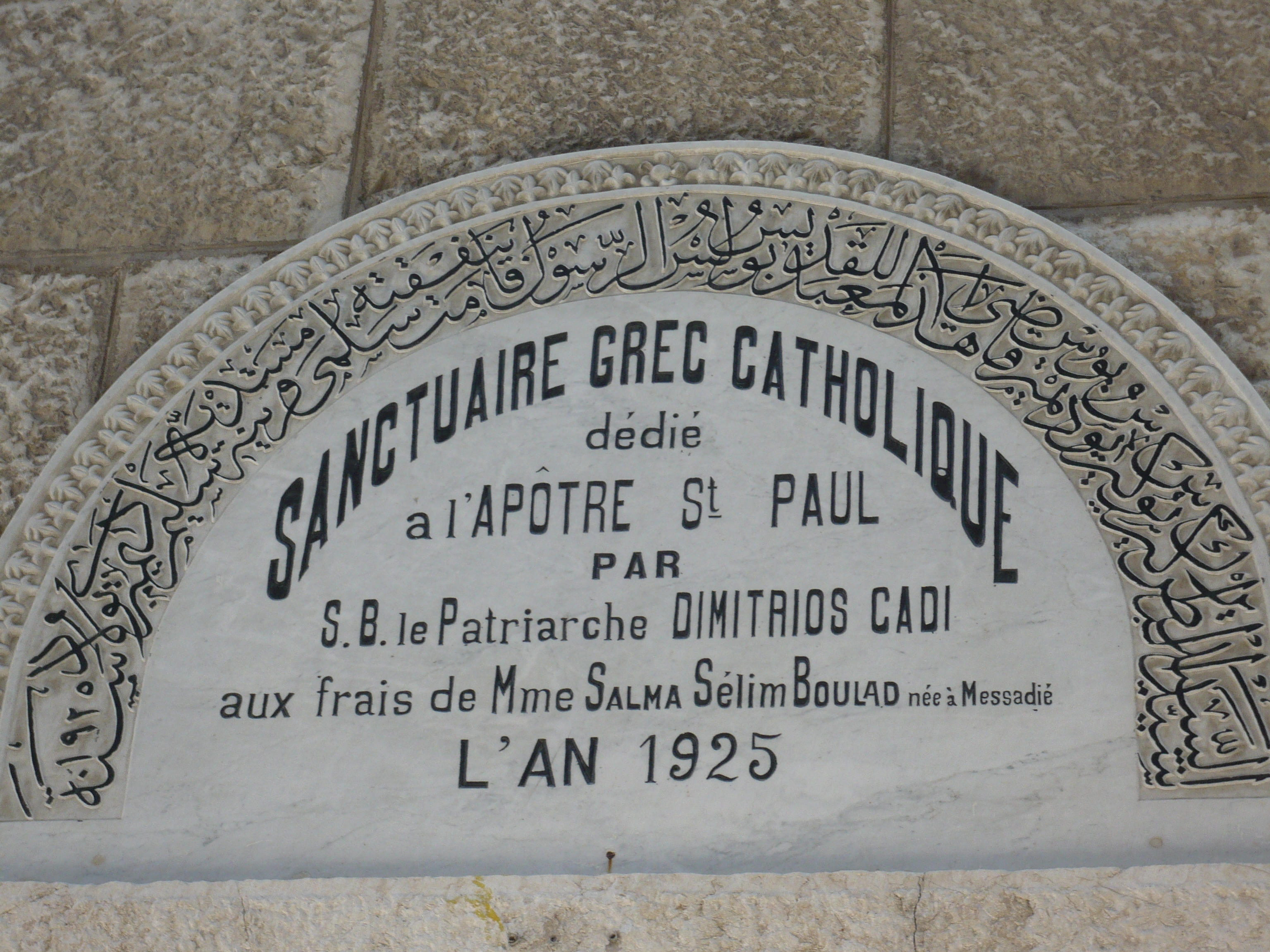 La chapelle St Paul a été financée en 1925 par Madame Salma Boulad, épouse de Sélim Boulad, propriétaire terrien.